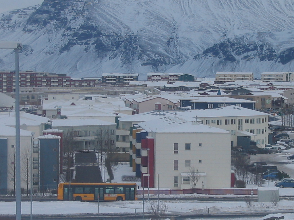 Міська дільниця Спьонґ, місто Рейк'явік, Ісландія.